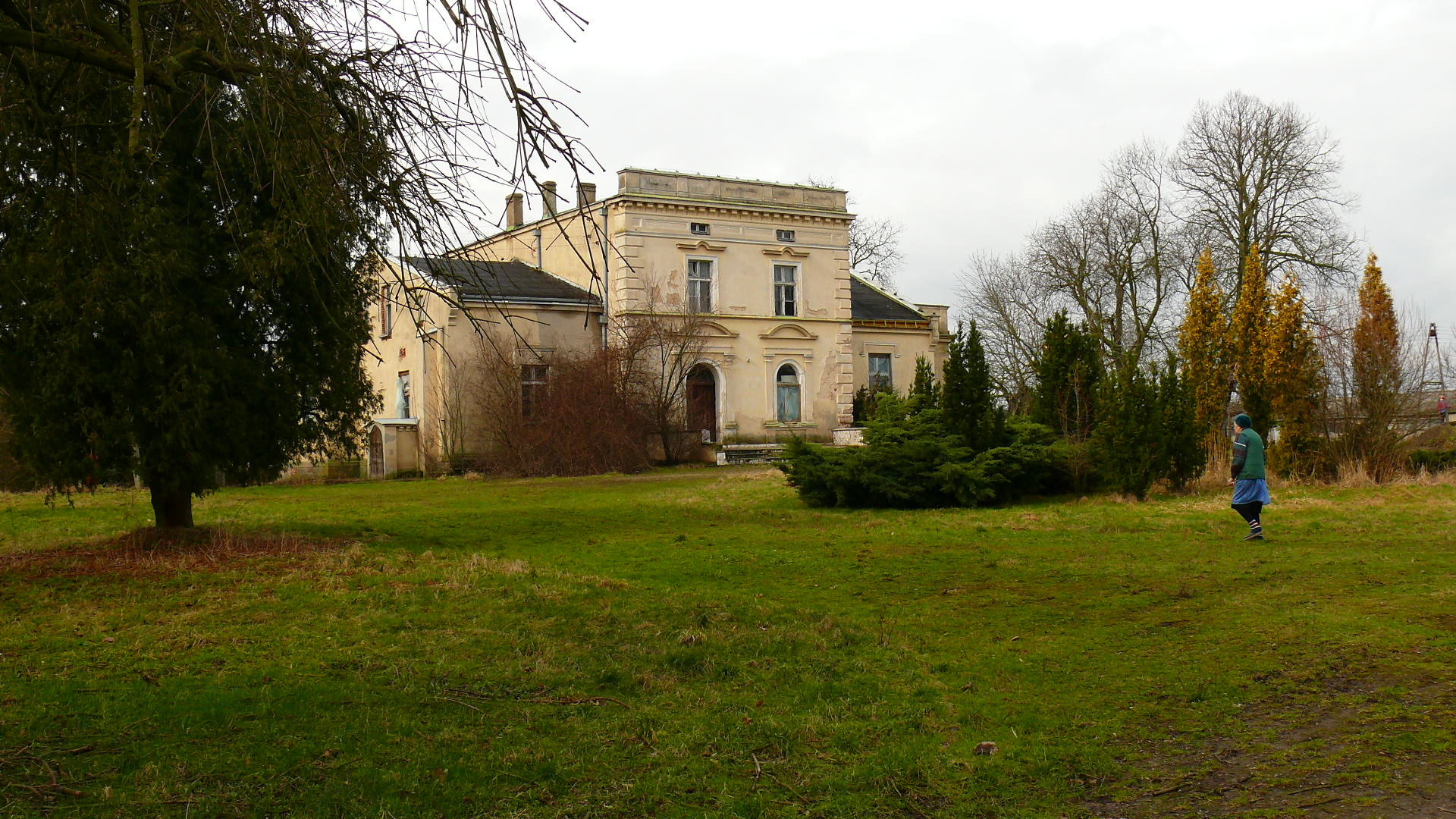 Kociałkowa Górka - pałac